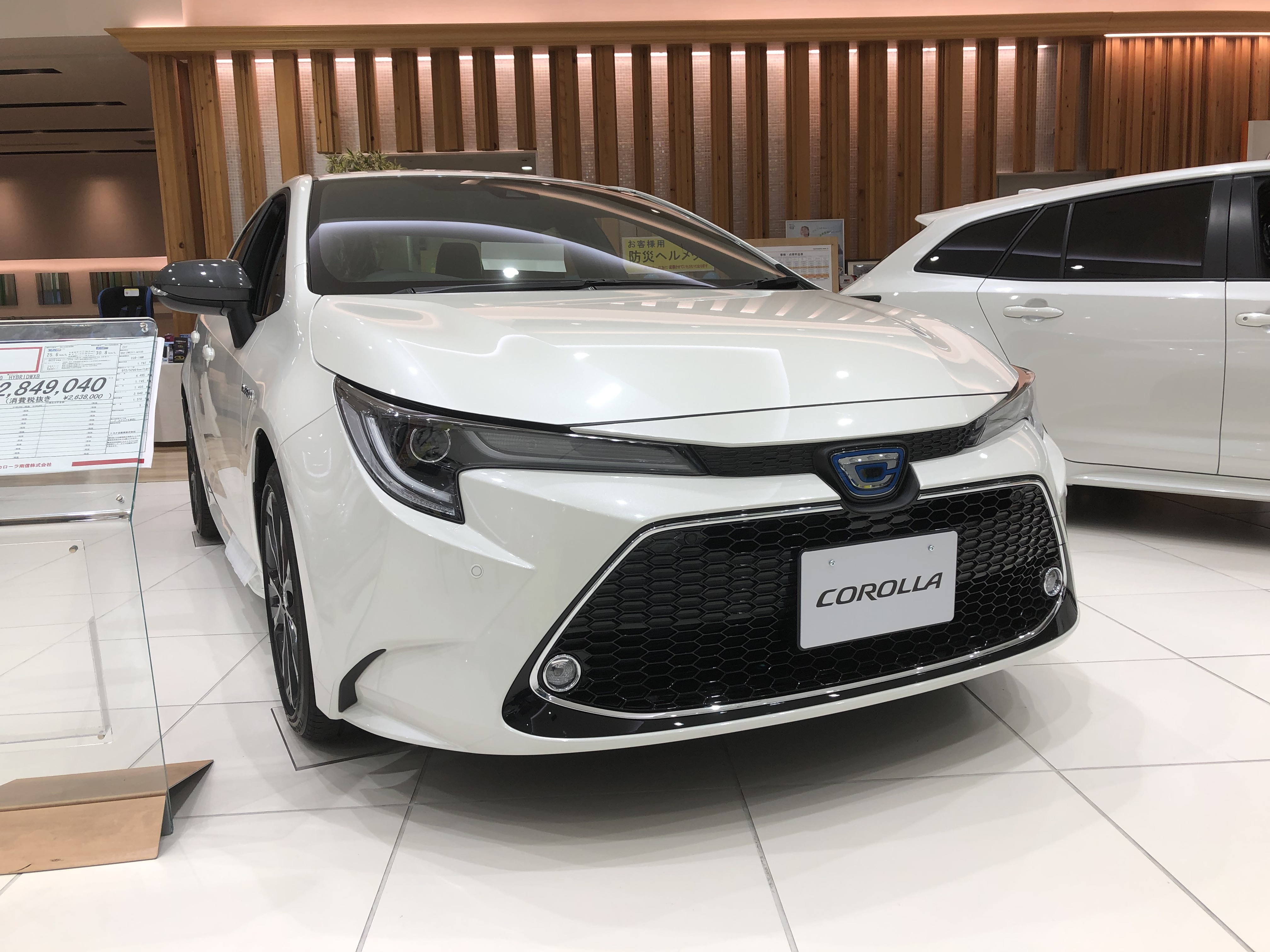 2019年9月登場のカローラ HYBRID W×Bをフロントより撮影。